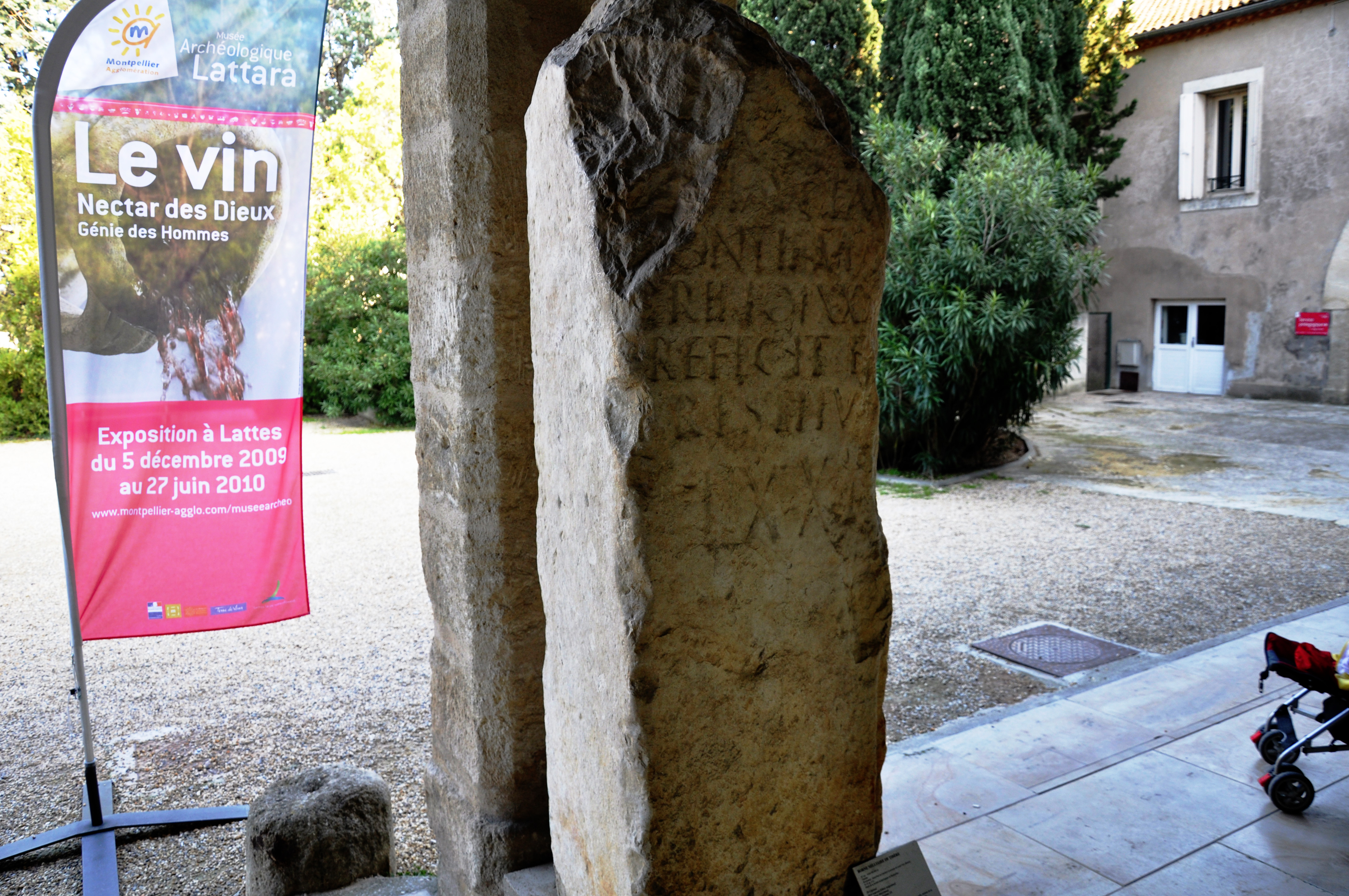 Borne milliaire de Tibère issue de Lunel-Viel, liée à Ambrussum et à la Via Domitia, avec drapeau de l'exposition Le vin, nectar des dieux, génie des hommes, située au musée archéologique Henri-Prades sur la commune de Lattes.